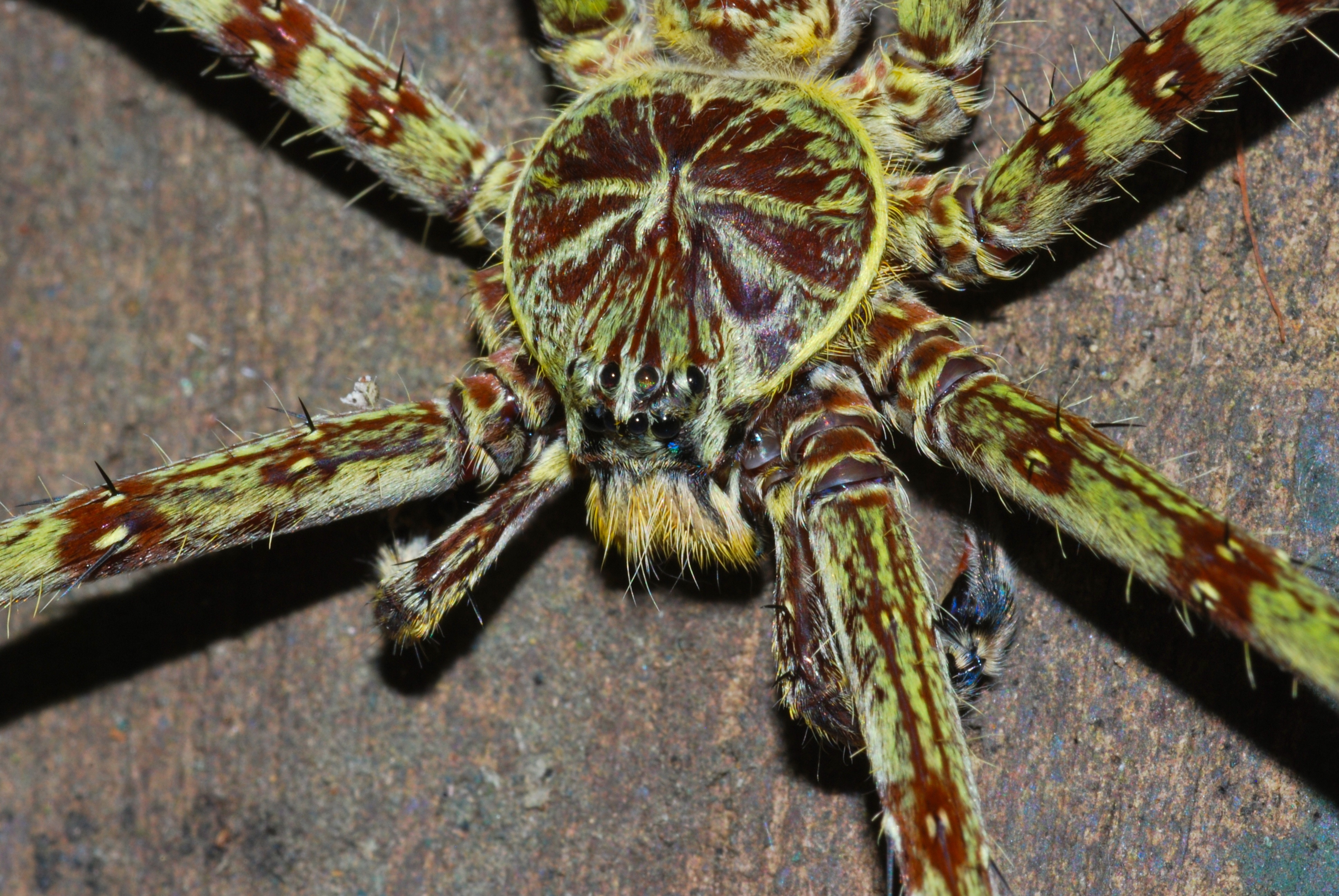 Uncle Tan's Jungle Camp, Kinabatangan River, Sabah, MALAYSIA